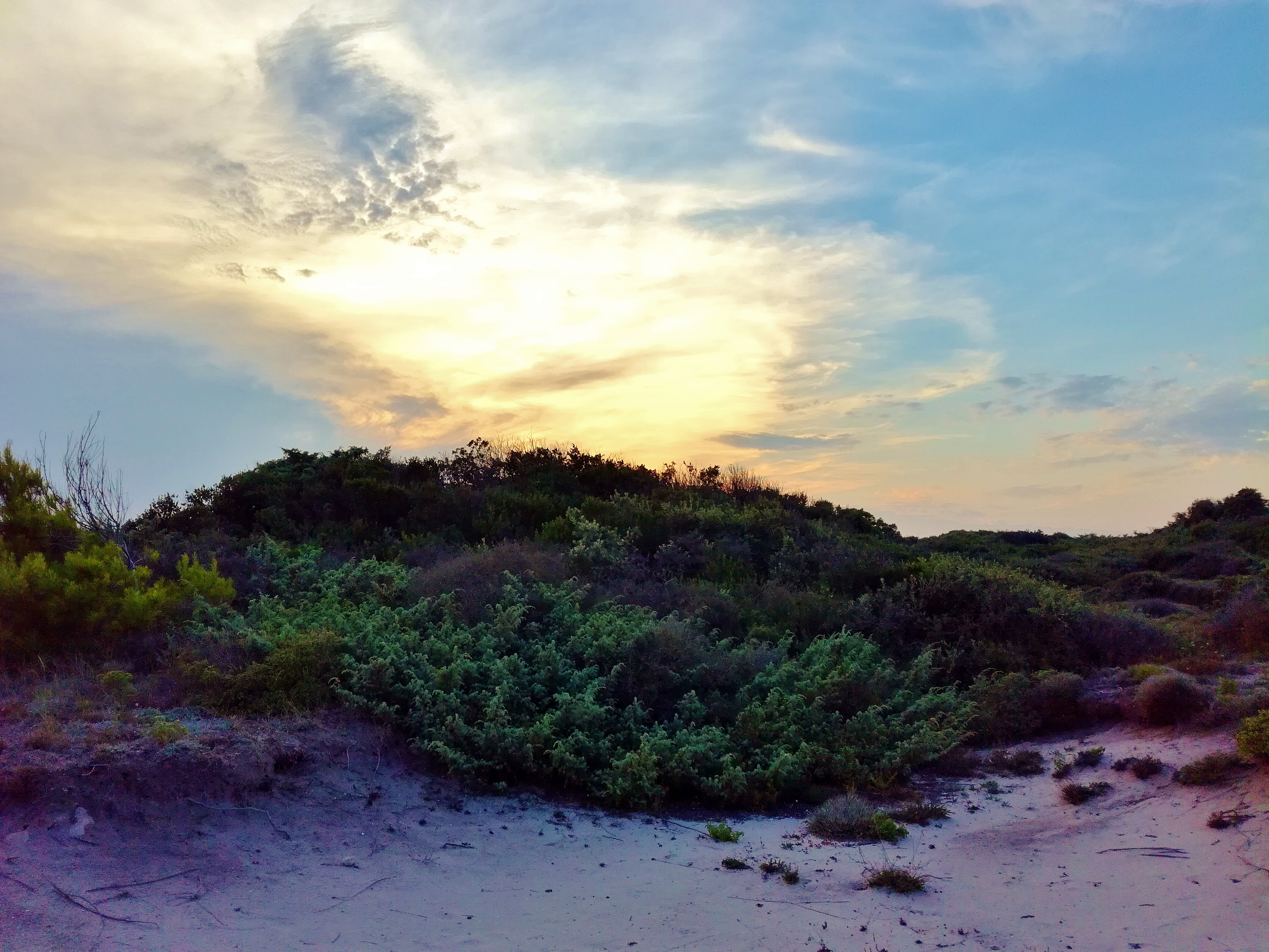 Area retrodunale nella Riserva naturale statale Torre Guaceto. This is a photo of a monument which is part of cultural heritage of Italy. The authorisation for taking photos of this object was provided by the World Wide Fund for Nature Italy.